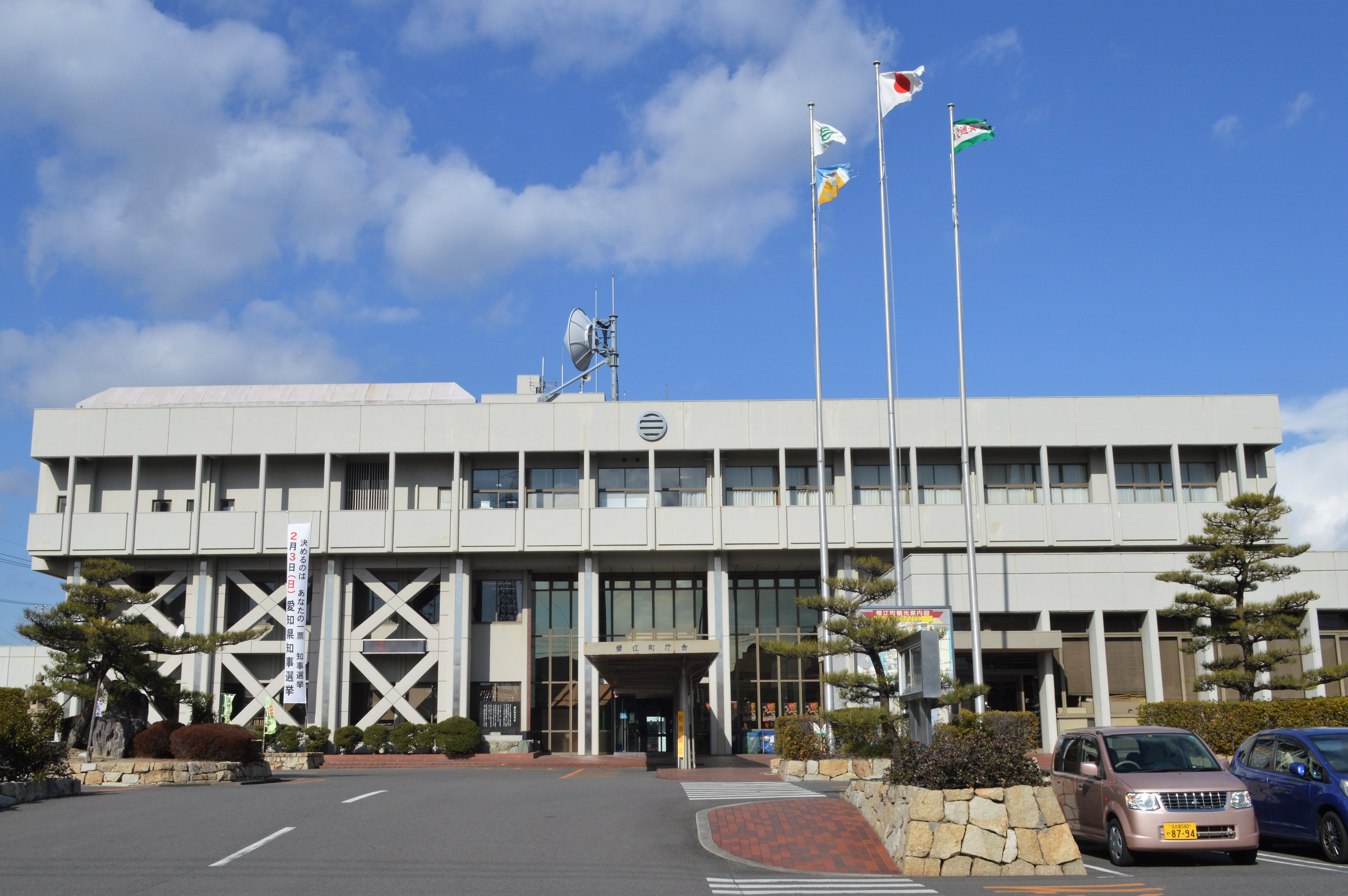 愛知県海部郡蟹江町の蟹江町役場。